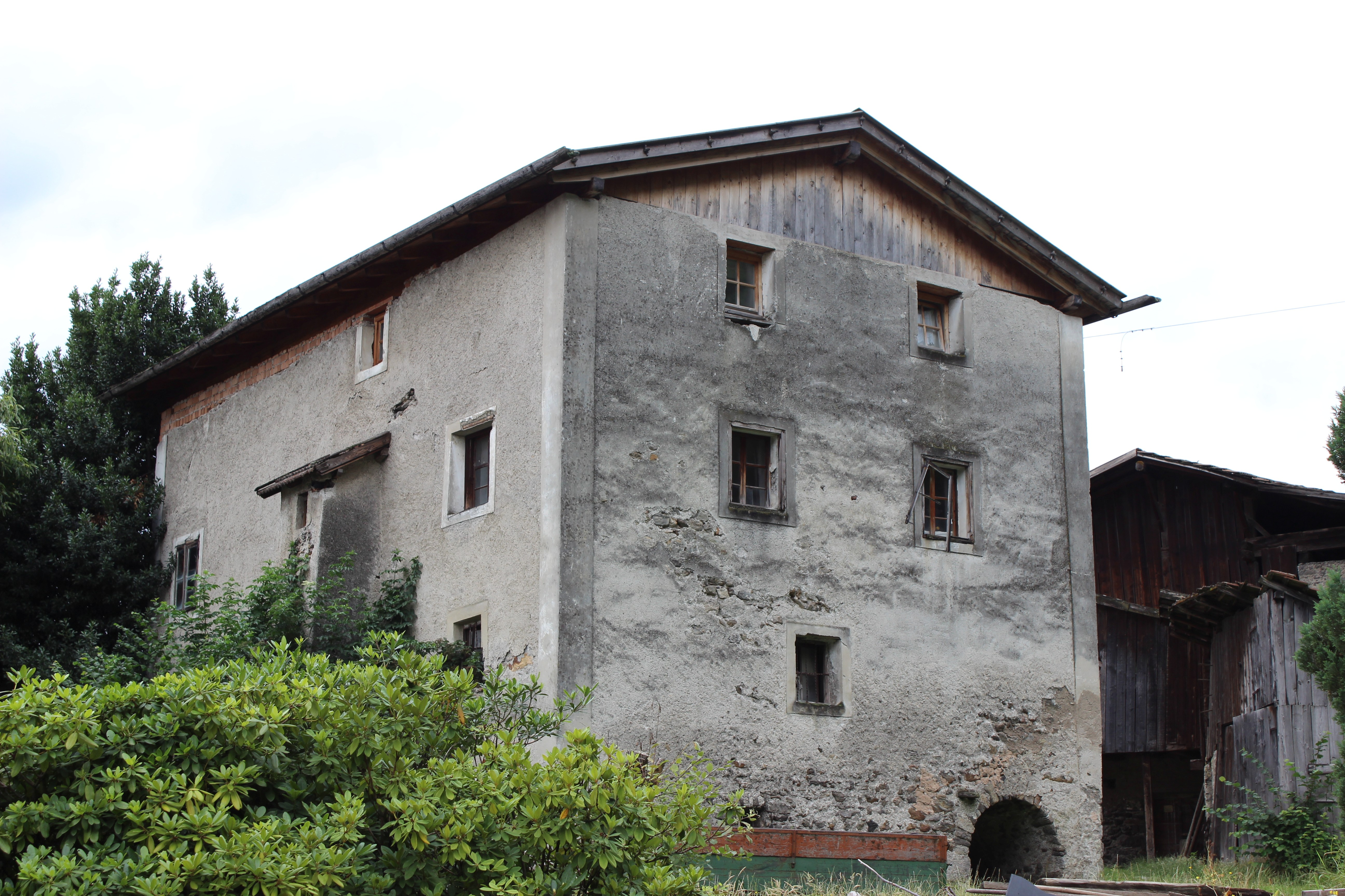 Hochhueb in Partschins (Südtirol)